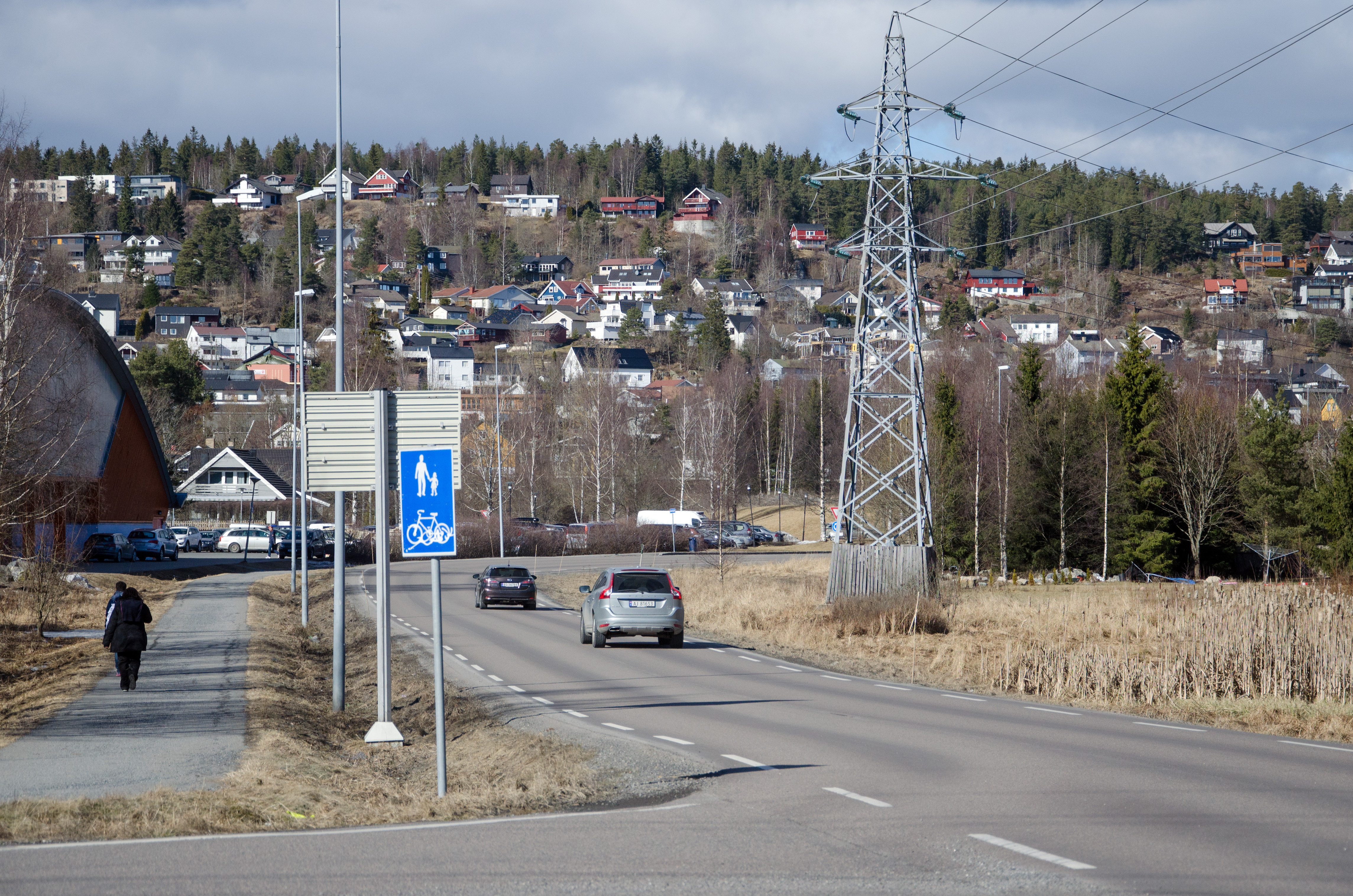 Fylkesvei 355 Kloppaveien